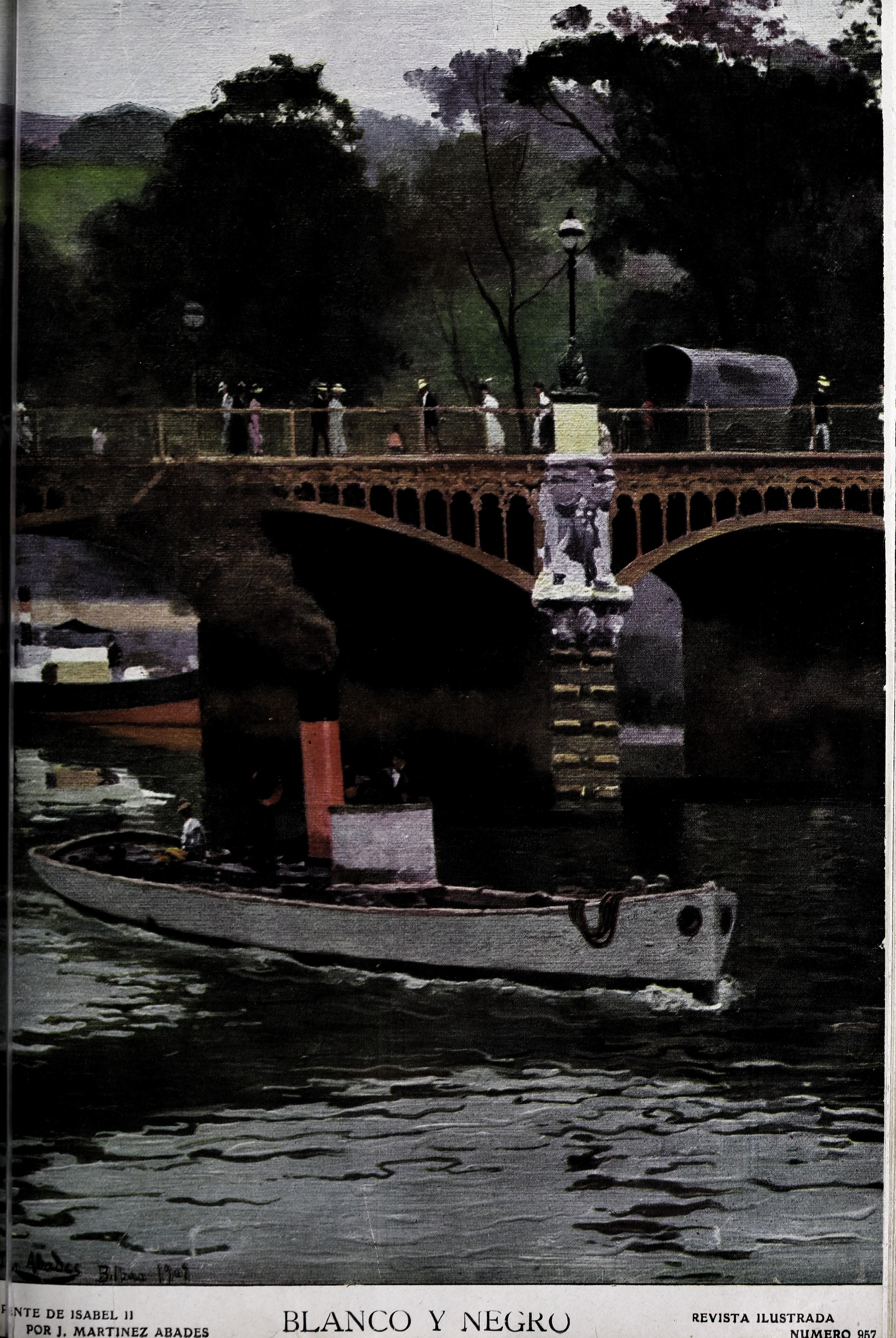 Puente de Isabel II (puente del Arenal).